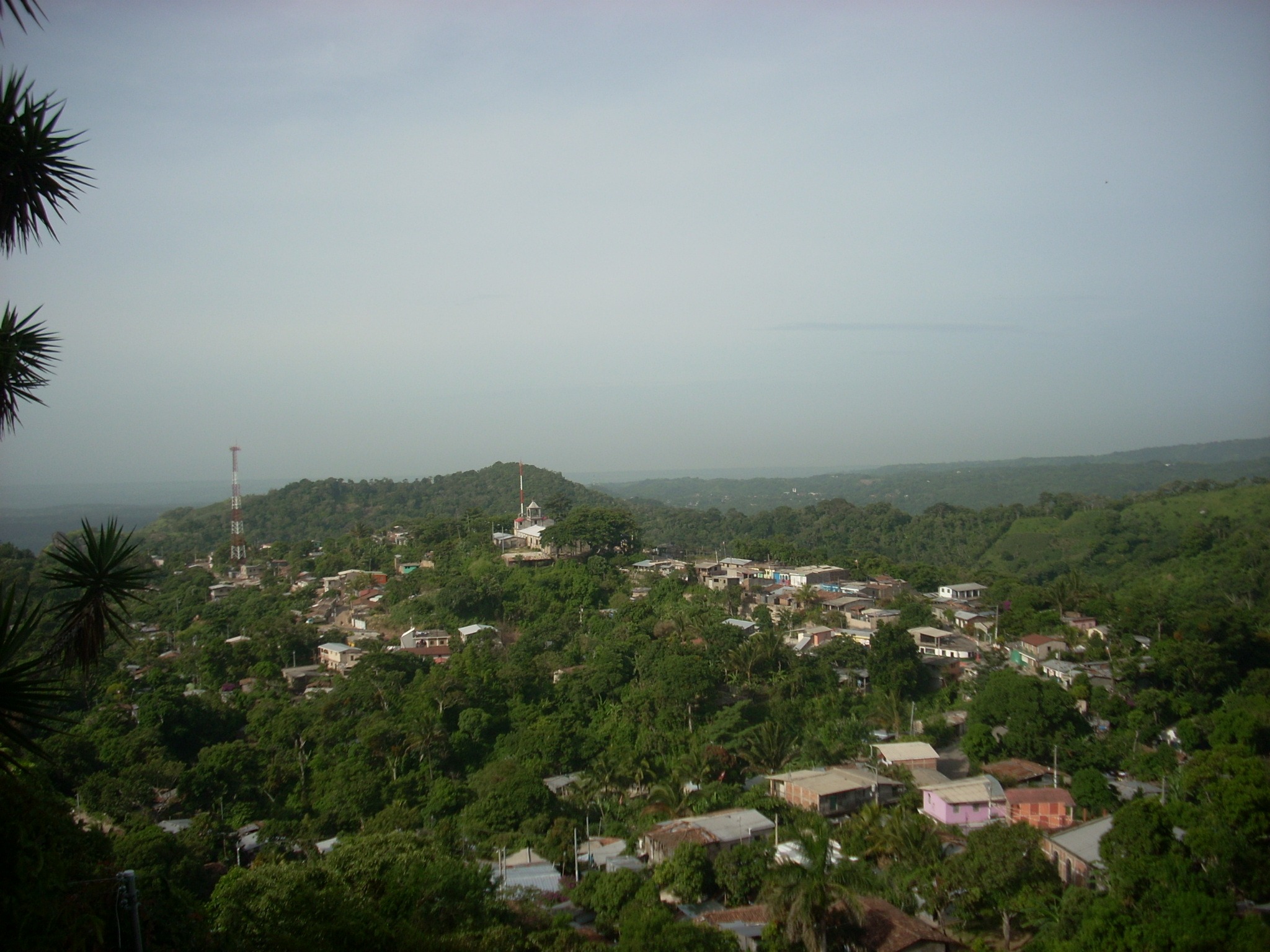 Toma panorámica de San Francisco Chinameca